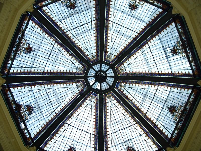 Zagreb